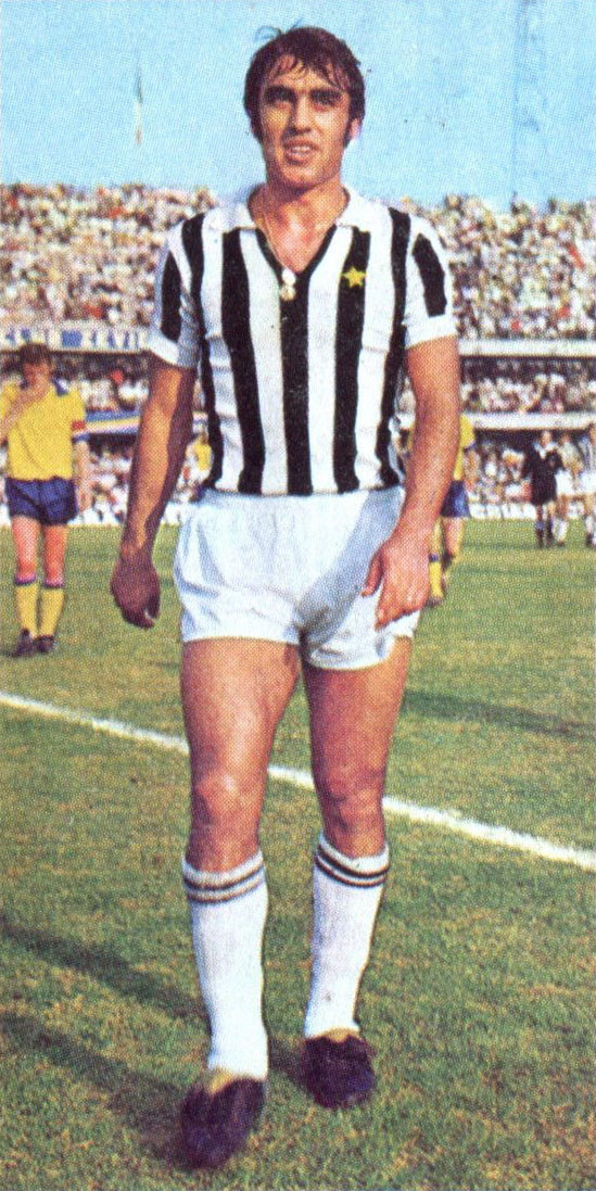 Verona, stadio Marcantonio Bentegodi, 11 ottobre 1970. Il calciatore italiano Pietro Anastasi alla Juventus, in occasione della trasferta sul campo del Verona (0-0) valevole per la 3ª giornata del campionato italiano di Serie A 1970-71.